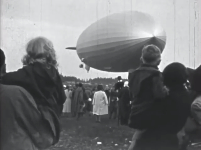 Zwischenlandung der "Graf Zeppelin2" in Bad Neustadt an der Saale im Juni 1939